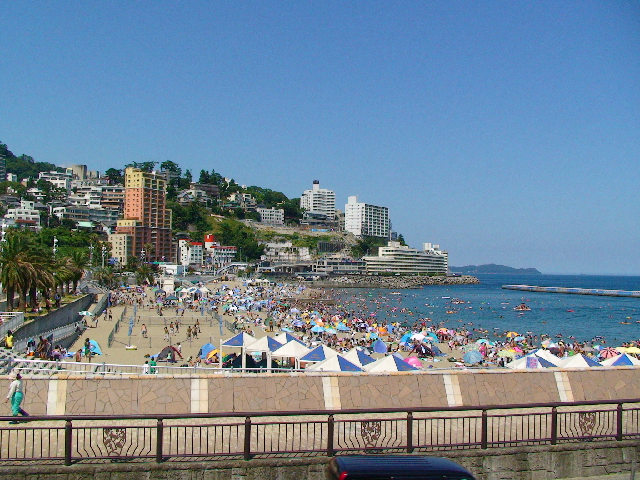 熱海サンビーチ(熱海ムーンライトビーチ)海水浴場